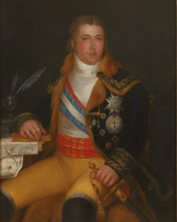 Retrato del politico y militar español Manuel de Godoy (1767-1851), que fue valido del rey Carlos IV de España.